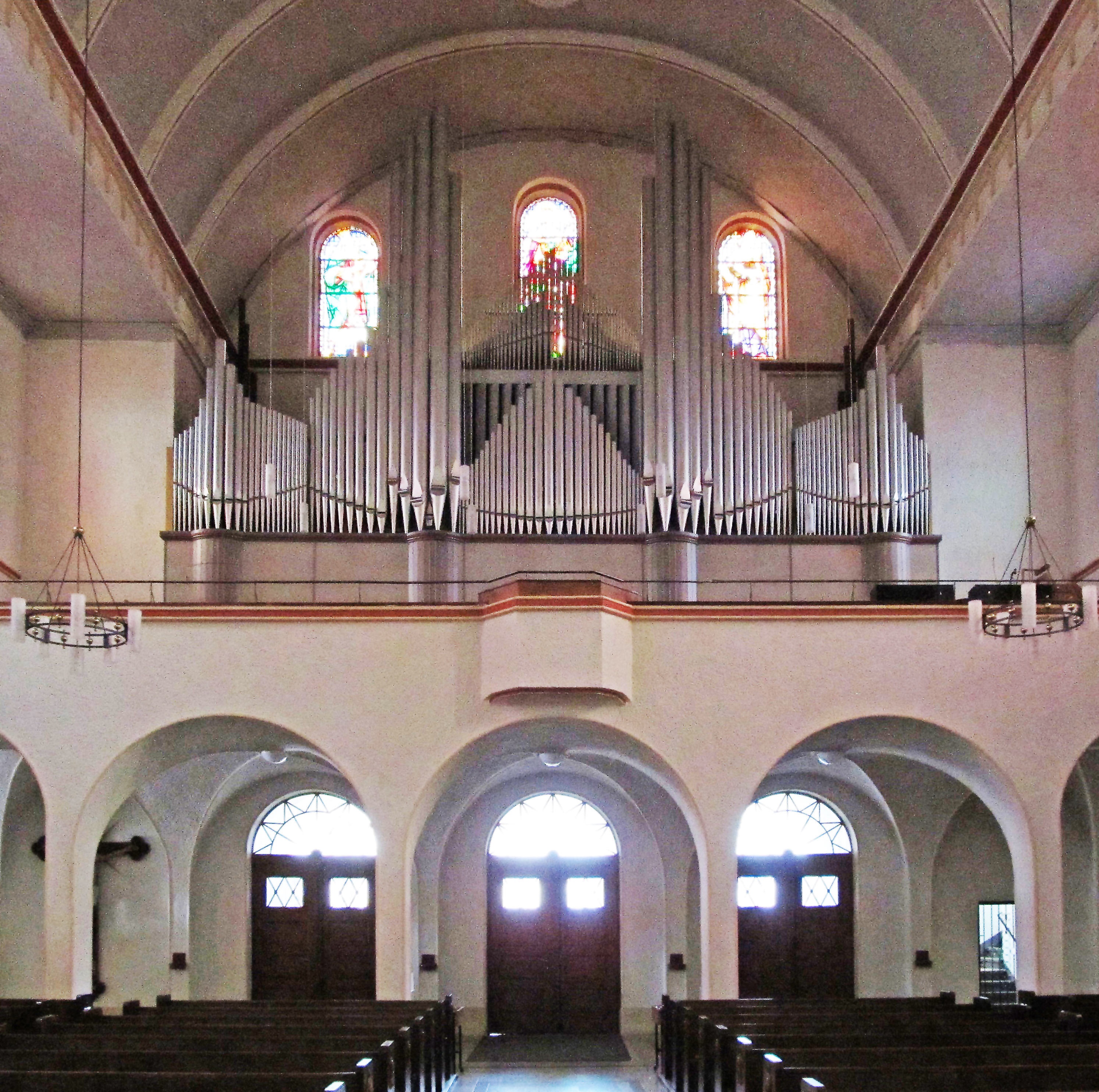 Orgelempore in der Allerheiligenkirche Sulzbach/Saar